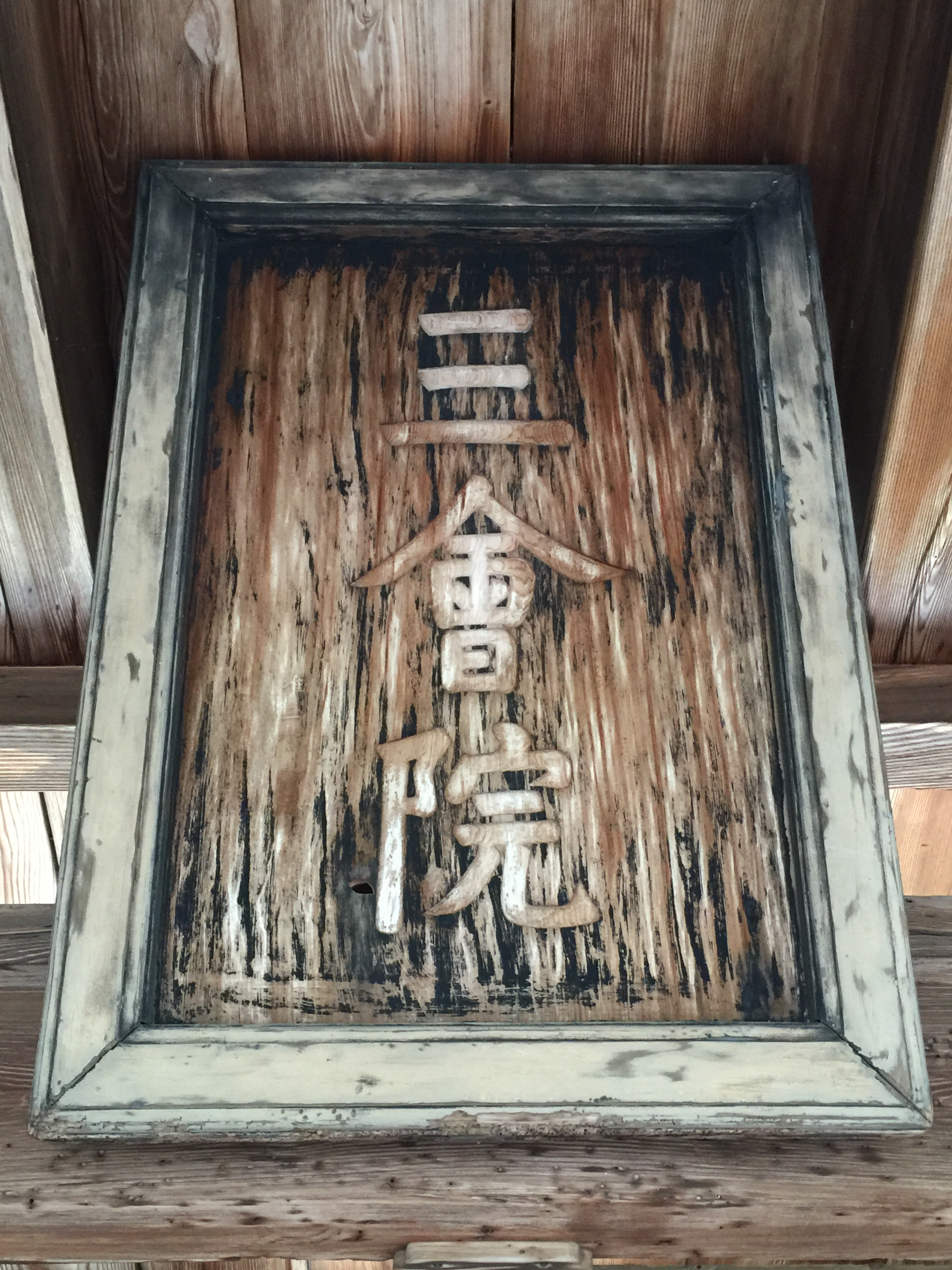 臨川寺中門三会院の額